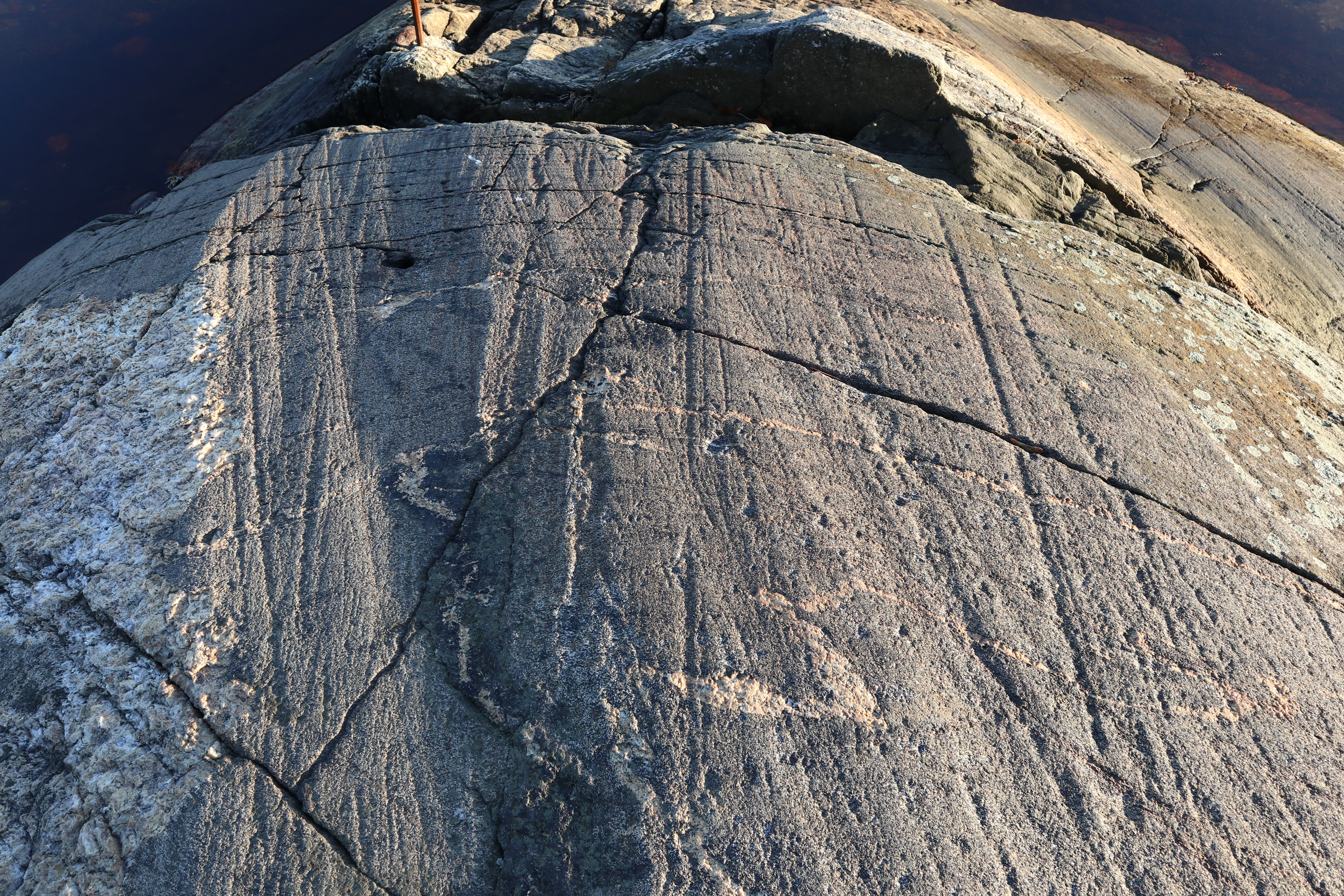 Skuringsstriper på svaberg ved Rødstranda.